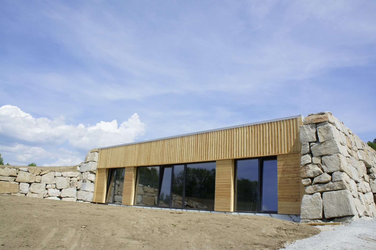 Erdhaus aus Fertigbetonteilen in Süd- Westlage. Verbaut in Hanglage mit ortstypischen Materialien zur Verkleidung (Granit und Holz) in Breitenberg (Bayerischer Wald)